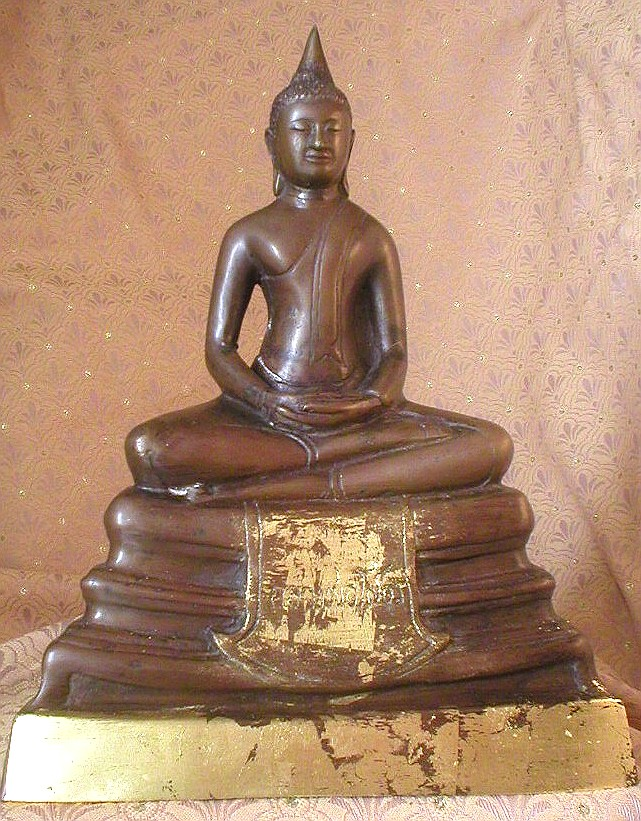 Statuette de Bouddha - Bronze - Hauteur 24 cm Photo personnelle Siren